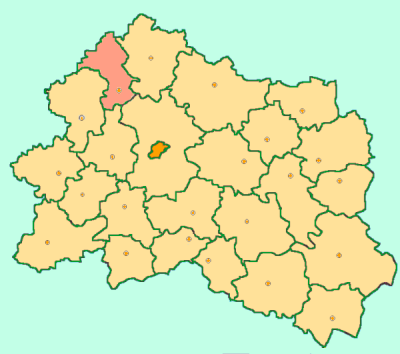 Orel Oblast map by Al Silonov Карта районов Орловской области